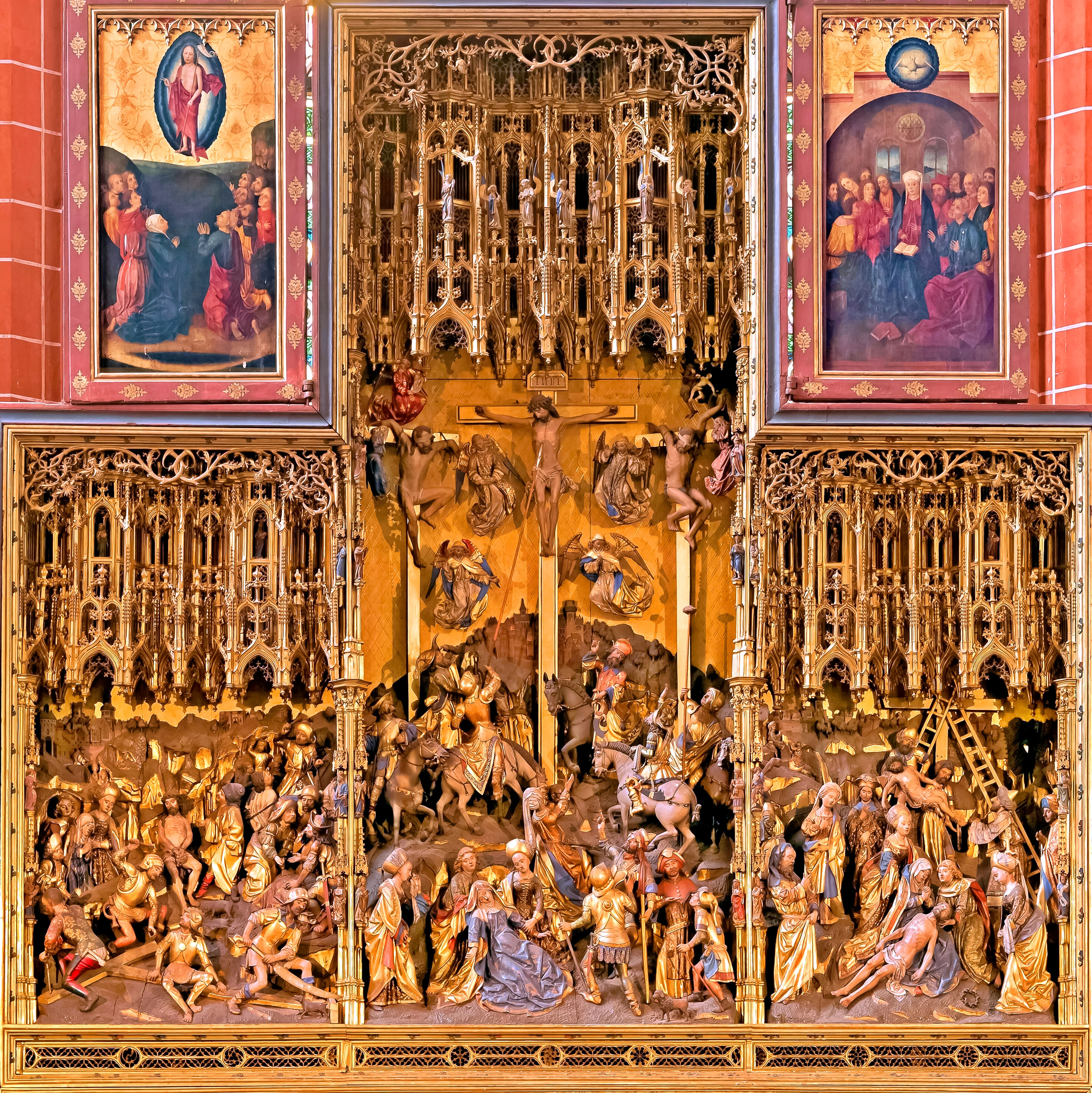 Spätgotisches Hochaltarretabel aus der Antwerpener Schule mit Passionsszenen